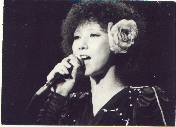 前野曜子始めてのリサイタルにて ８０年代初期